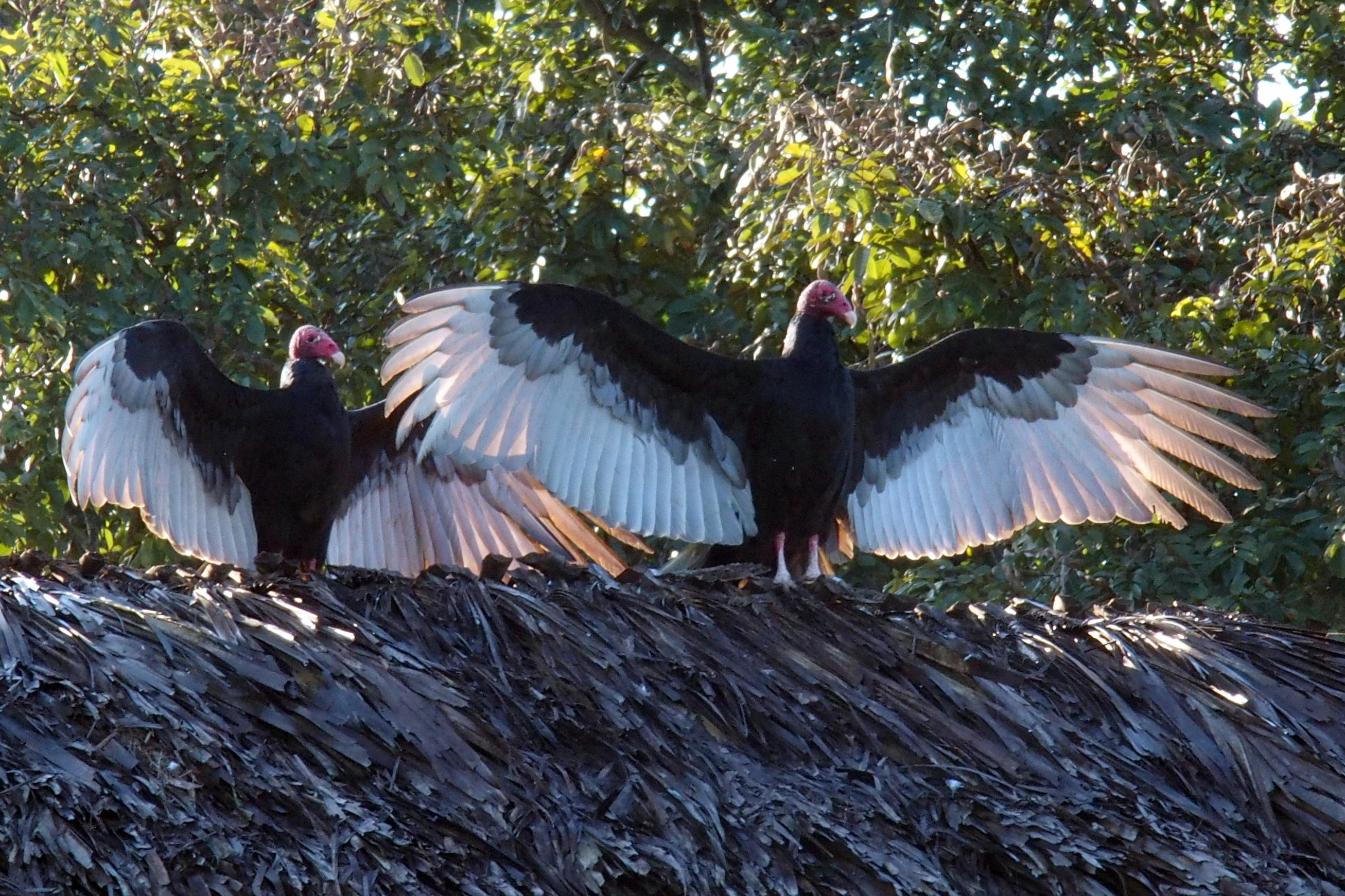 Truthahngeier